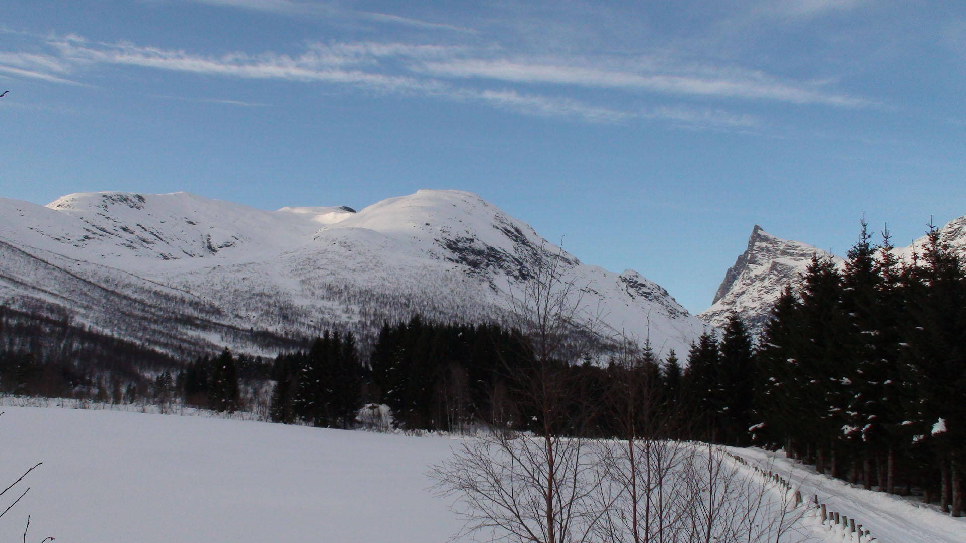 Nausen midt i bildet.Hatten er synlig som ei svart egg til venstre for Nausen. Honndalsrokken heilt til høgre. Bildet er teke frå Horndøla Bru